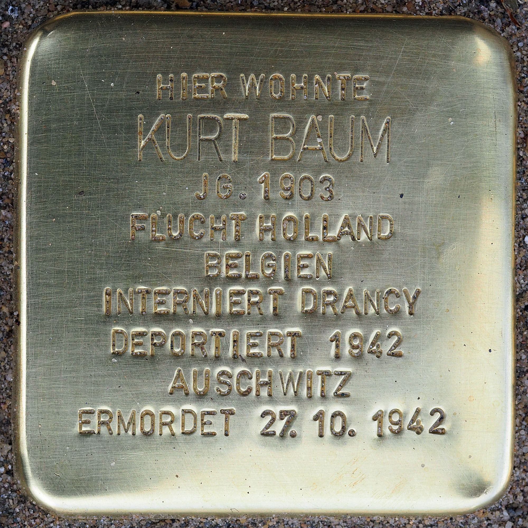 Stolpersteine Suechteln: Baum, Kurt